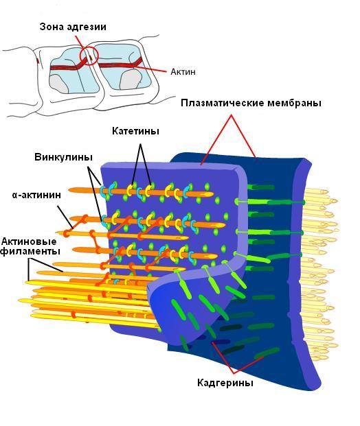 Адгезионный контакт